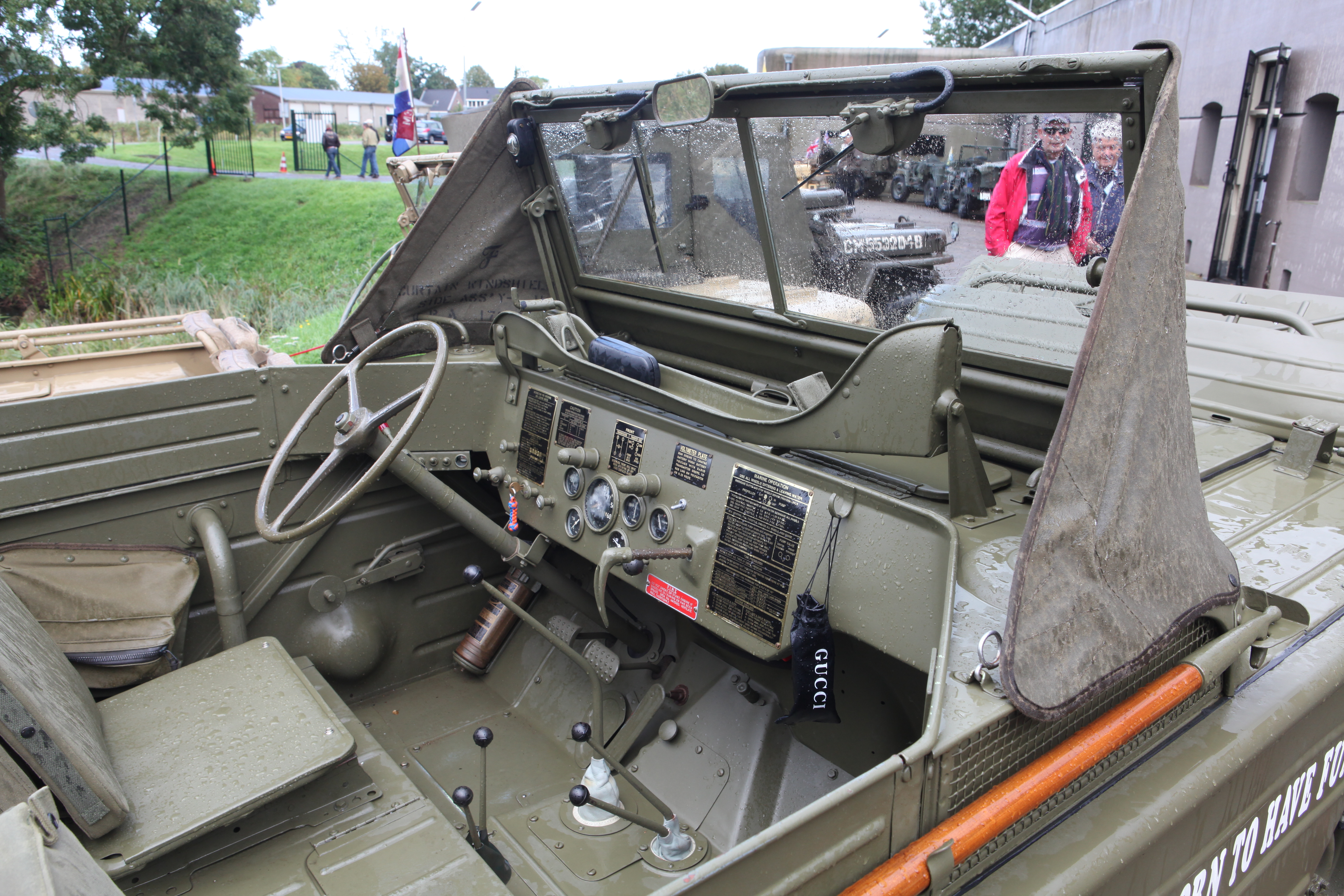 Ford GPA